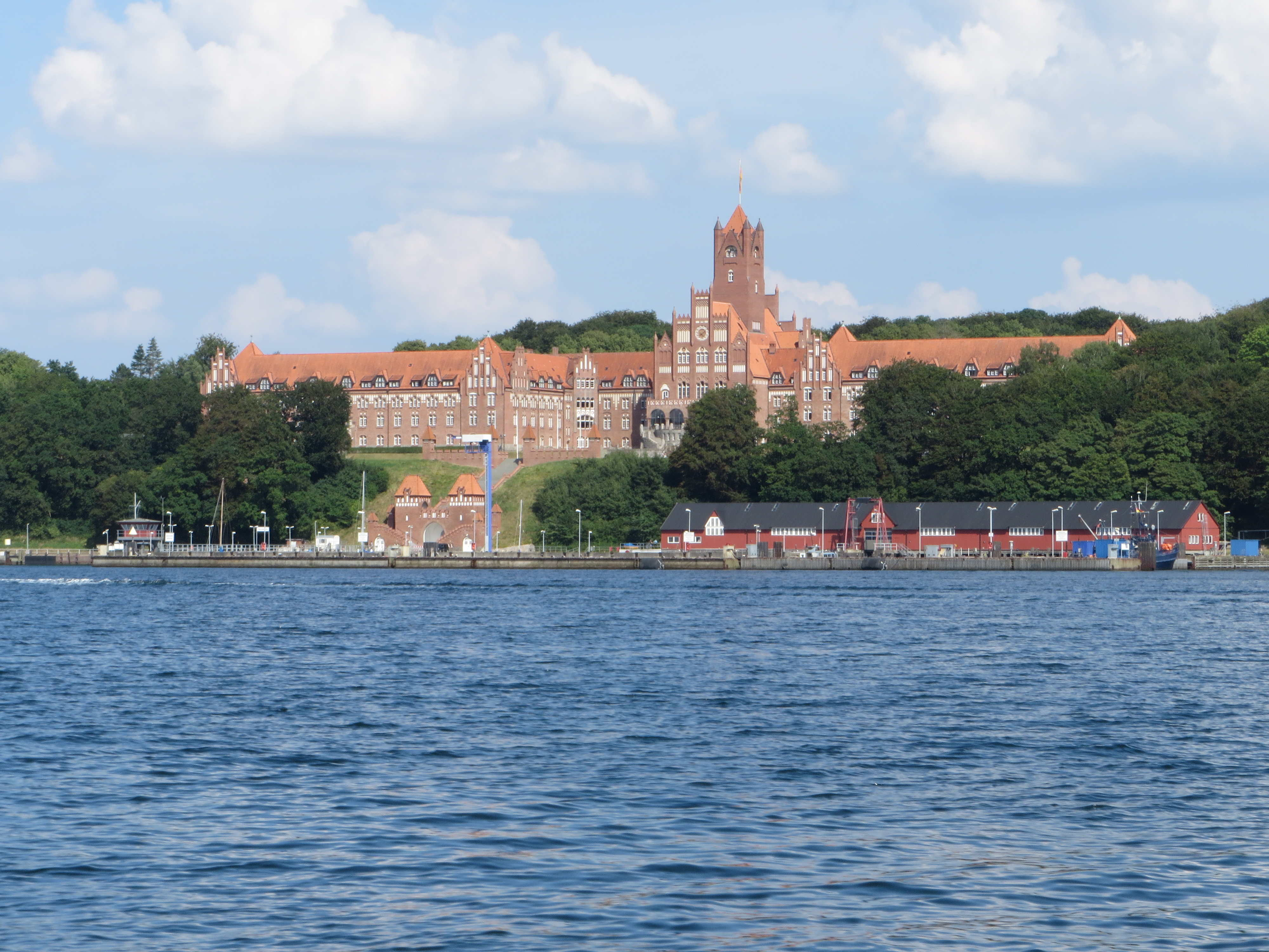 Das Rote Schloss am Meer (Flensburg-Mürwik Juli 2014), Bild 06